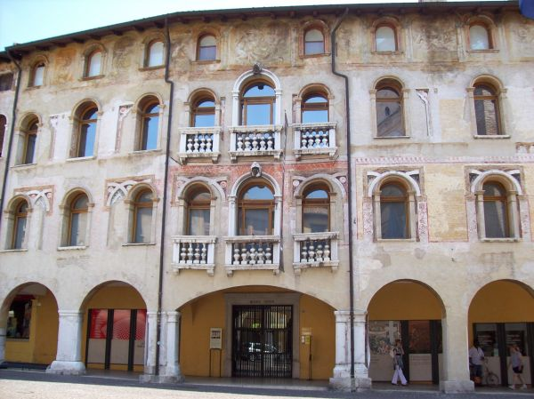 Pordenone-Palazzo Ricchieri, sede del Museo civico d'arte